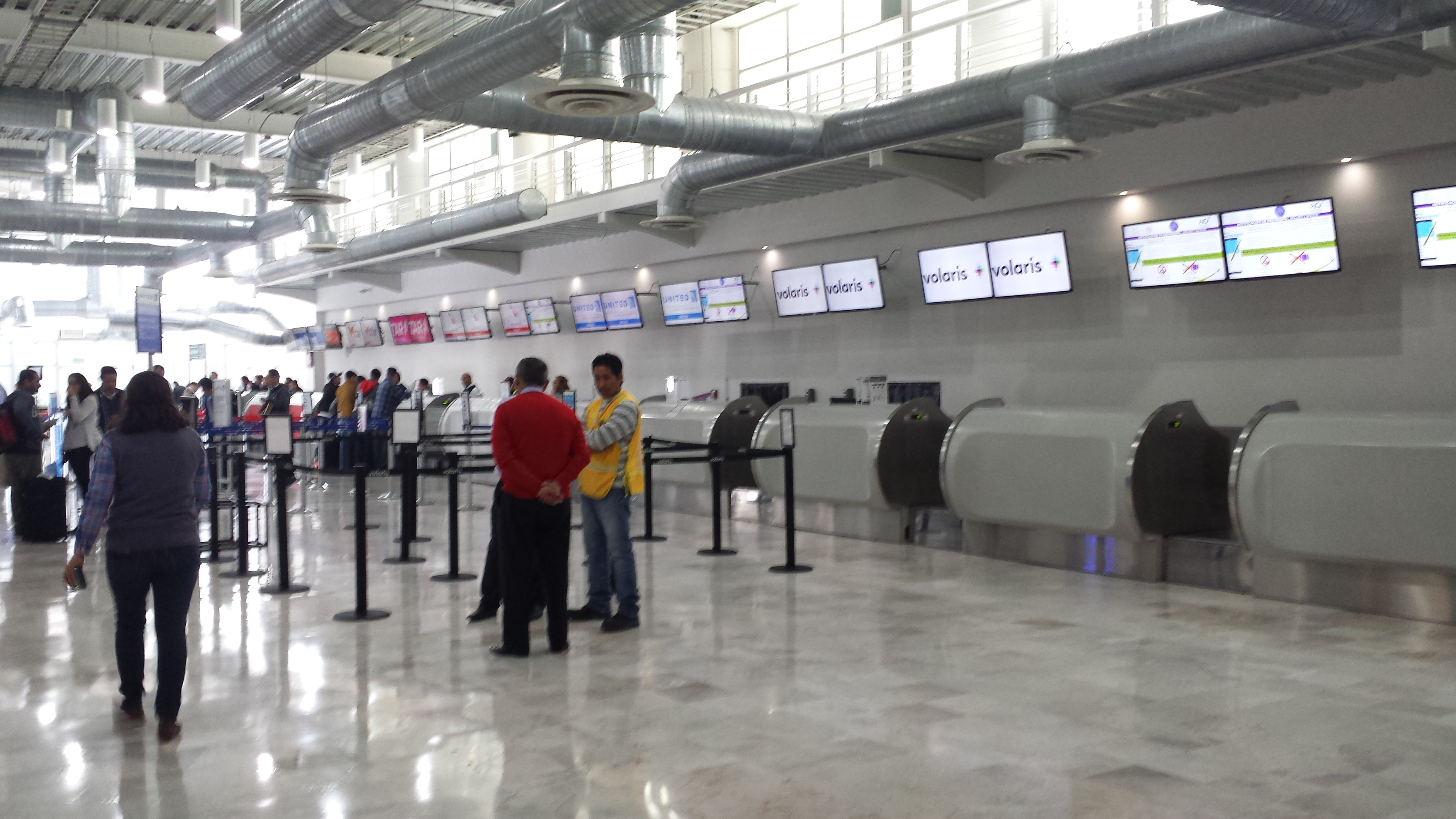 Fotografía del vestíbulo de Chequeo (sala de mostradores) Terminal de Pasajeros del Aeropuerto Intercontinental de Querétaro